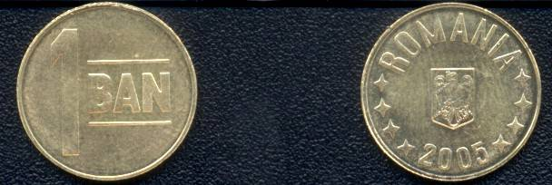 Romanian coin